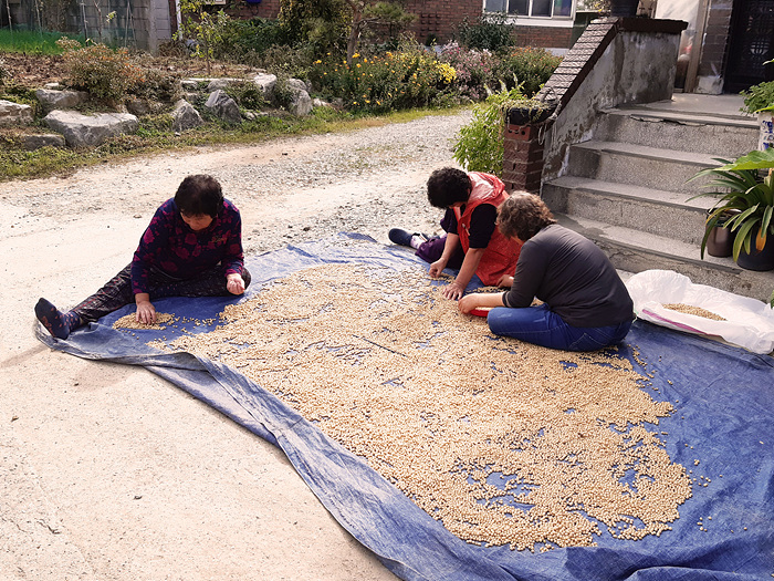 콩을 선별하는 모습- 요즘은 콩 선별기를 사용하나 시골일 경우 소량의 메주를 제작하는 경우가 많아서 직접 수작업으로 선별한다.